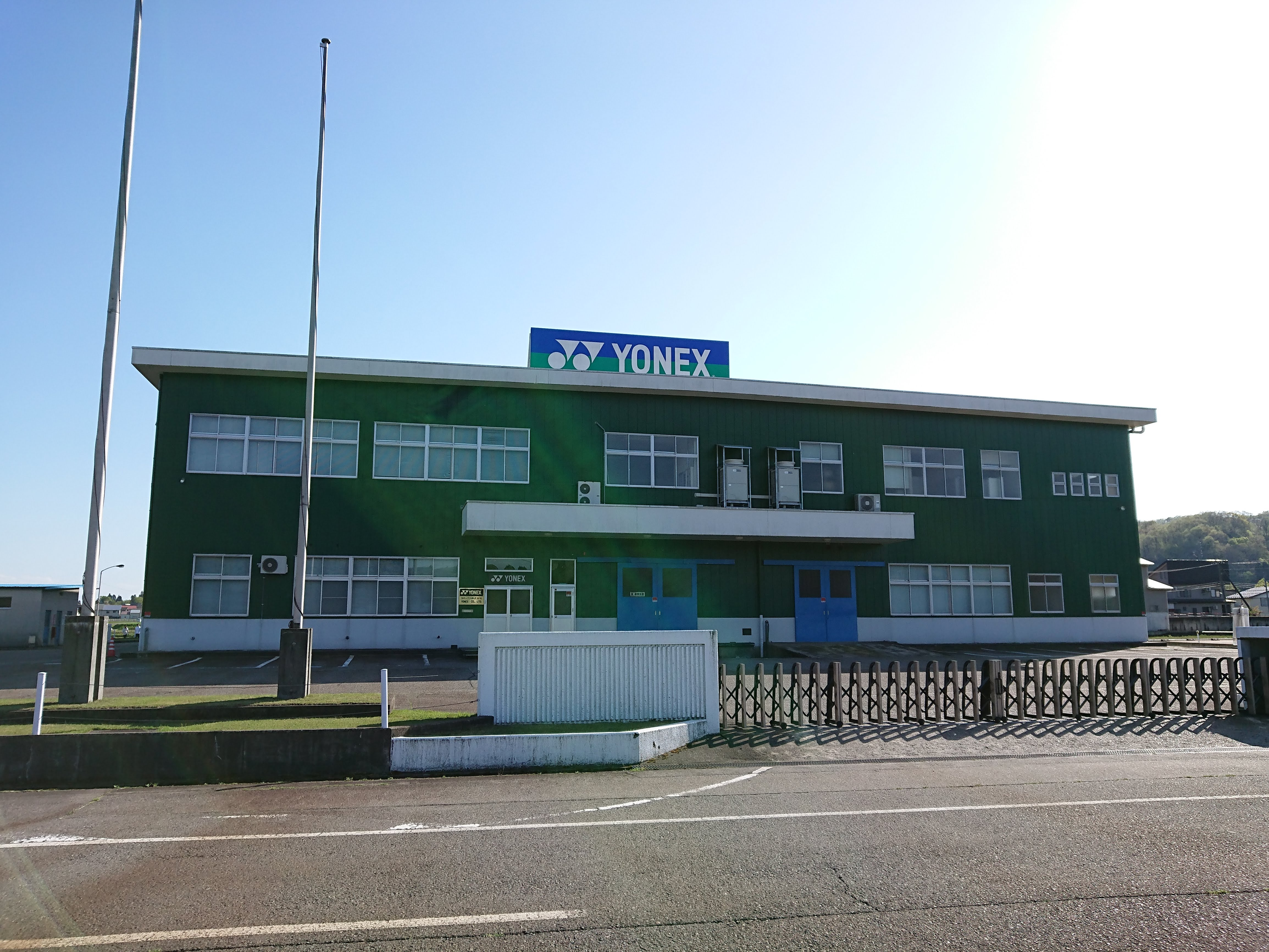 ヨネックスの工場外観